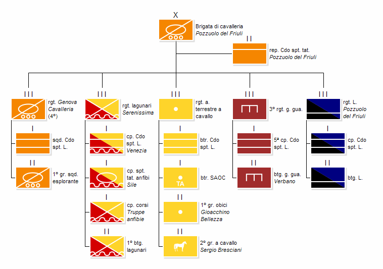 Attuale struttura della Brigata di Cavalleria "Pozzuolo del Friuli"